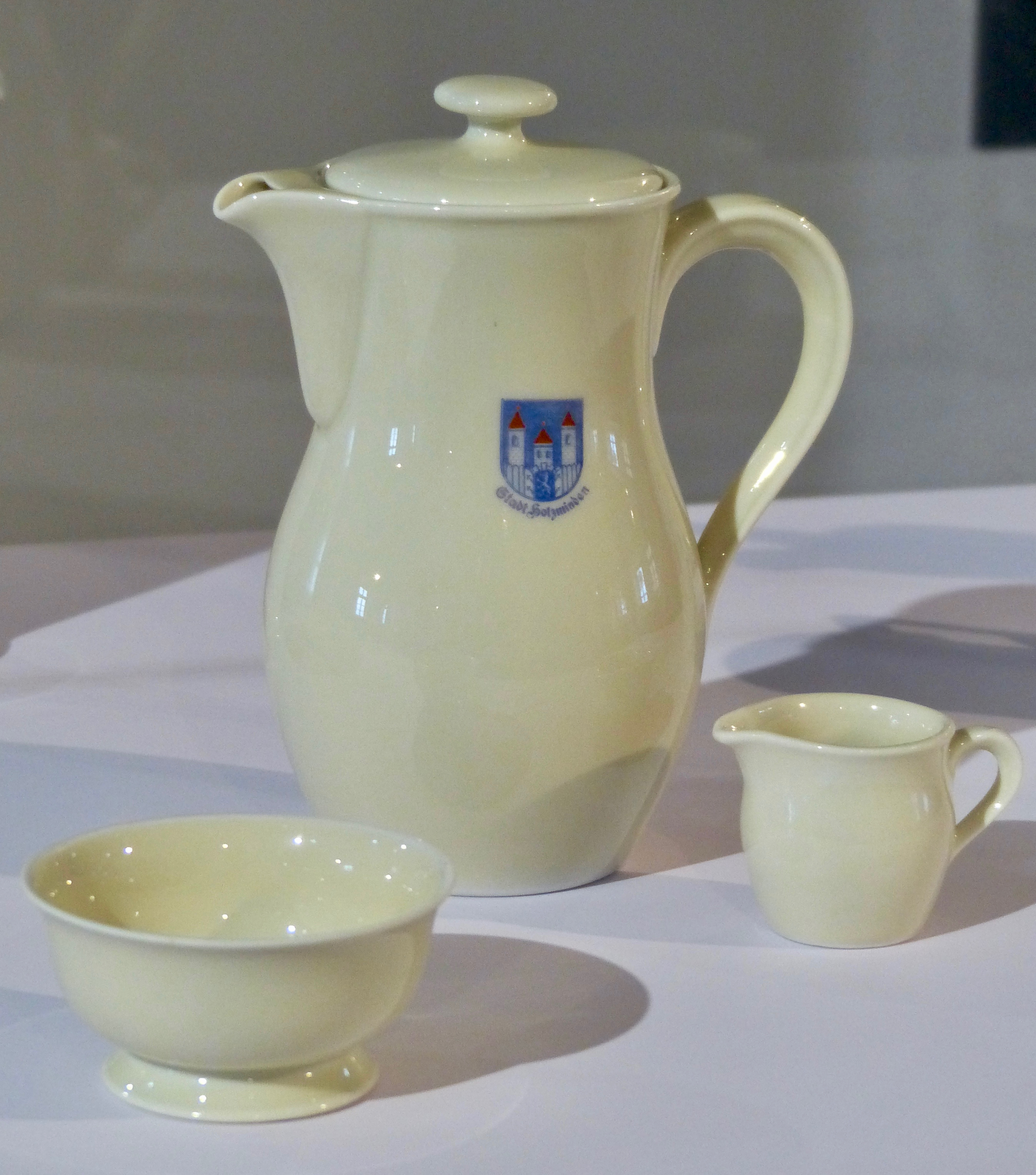 Geschirrteile des Service Wagenfeld 639, elfenbeinfarbene Glasur mit Vignette von Holzminden, um 1940 GLAM-on-Tour: Porzellanmanufaktur Fürstenberg Wikipedianer fotografierten vom 6.– 8. Oktober 2017 die Ausstellungstücke im Museum Schloss Fürstenberg, Glasmuseum Boffzen und im Kragstuhlmuseum. This photo was taken during a project supported by WMDE Gefördert von / Supported by: Wikimedia Deutschland, Museum Schloss Fürstenberg, Glasmuseum Boffzen und Kragstuhlmuseum Für das Museum Schloss Fürstenberg: This work is free and may be used by anyone for any purpose. If you wish to use this content, you do not need to request permission as long as you follow any licensing requirements mentioned on this page.